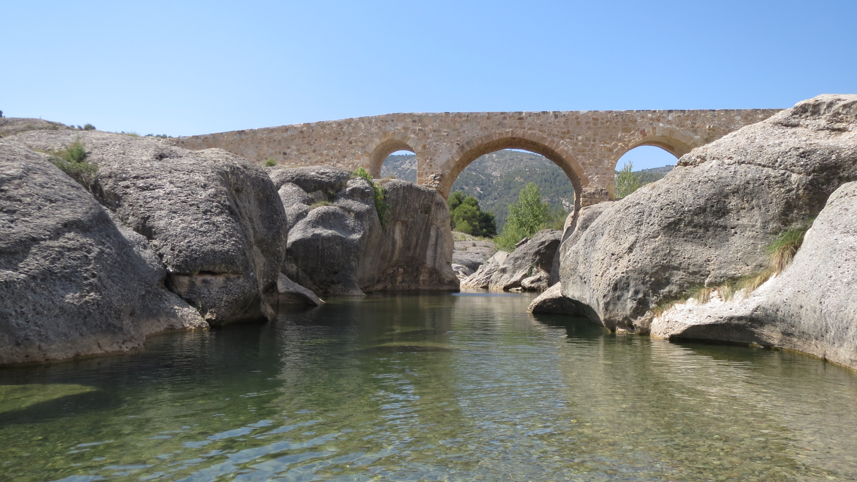 Río Bergantes This is a photography of a Site of Community Importance in Spain with the ID: ES2420117. Natura2000 entry, EEA entry